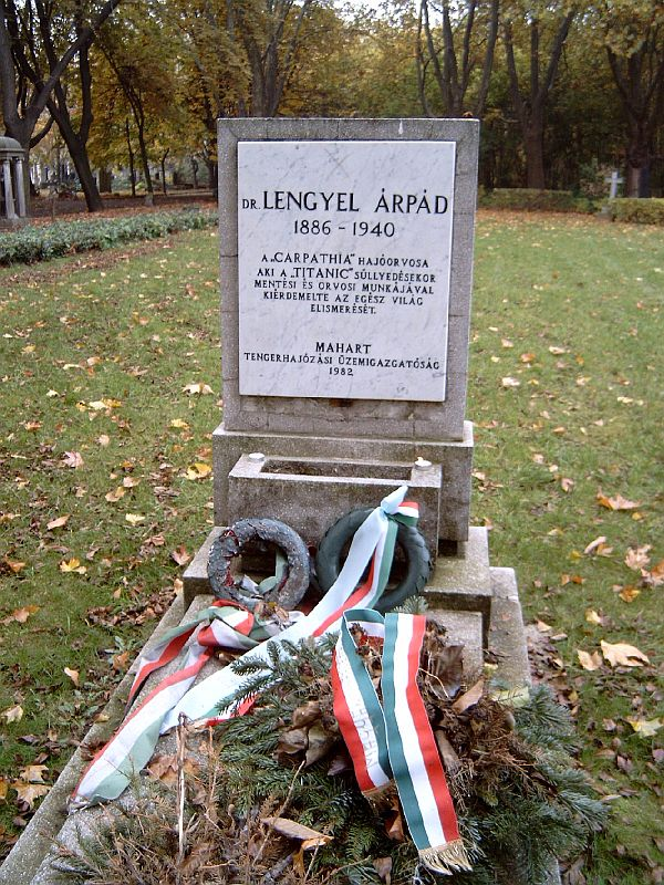 Lengyel Árpád (1886-1940), (a Carpathia 1912. április 11-i, New York-i indulással kiírt útján a 26 éves orvos, aki, mint később kiderült, a Titanic túlélőinek megmentője lett) orvos sírja Budapesten. Kerepesi temető: 41-13-41.